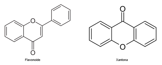 Flavonoides y xantonas